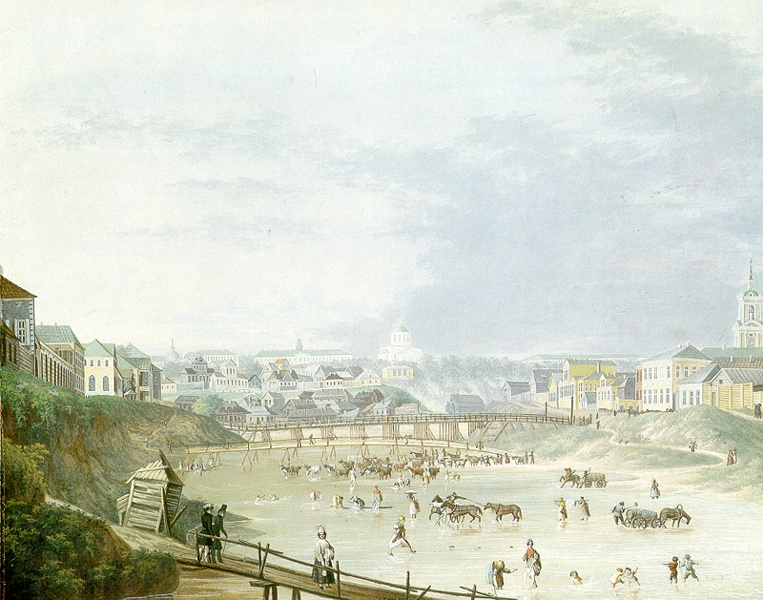 Акварель Г. К. Ю. Цапфа «Вид Орла в 30 е гг. XIX в.», хранящаяся в Государственном Эрмитаже (г. Санкт Петербург)